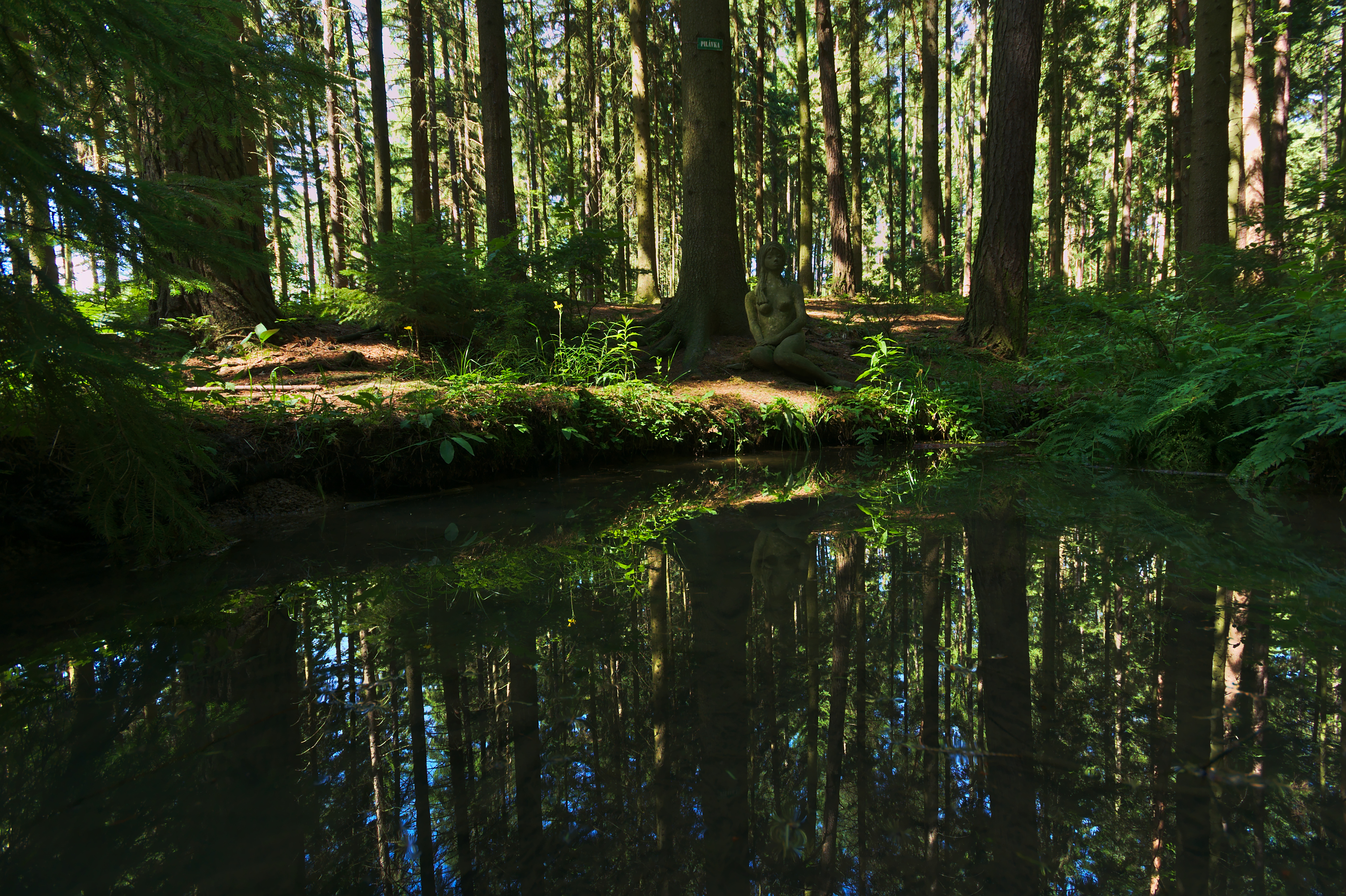 Pramen Pilávky v lese mezi Hvozdem a Hačkami, okres Prostějov